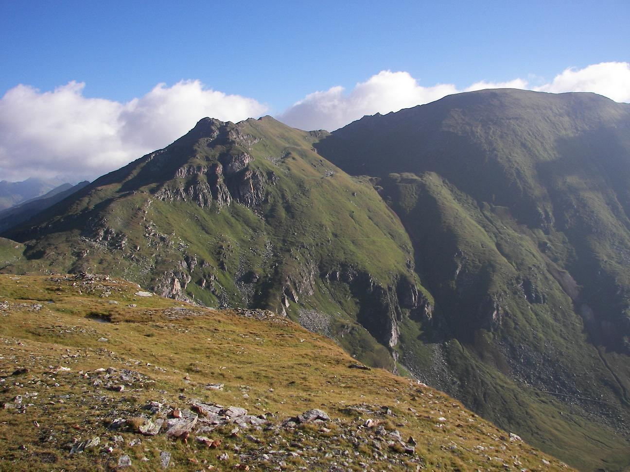 Silberpfennig aus Nähe Bockhartscharte